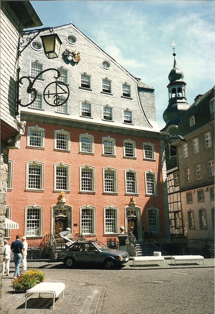 Rotes Haus, Monschau